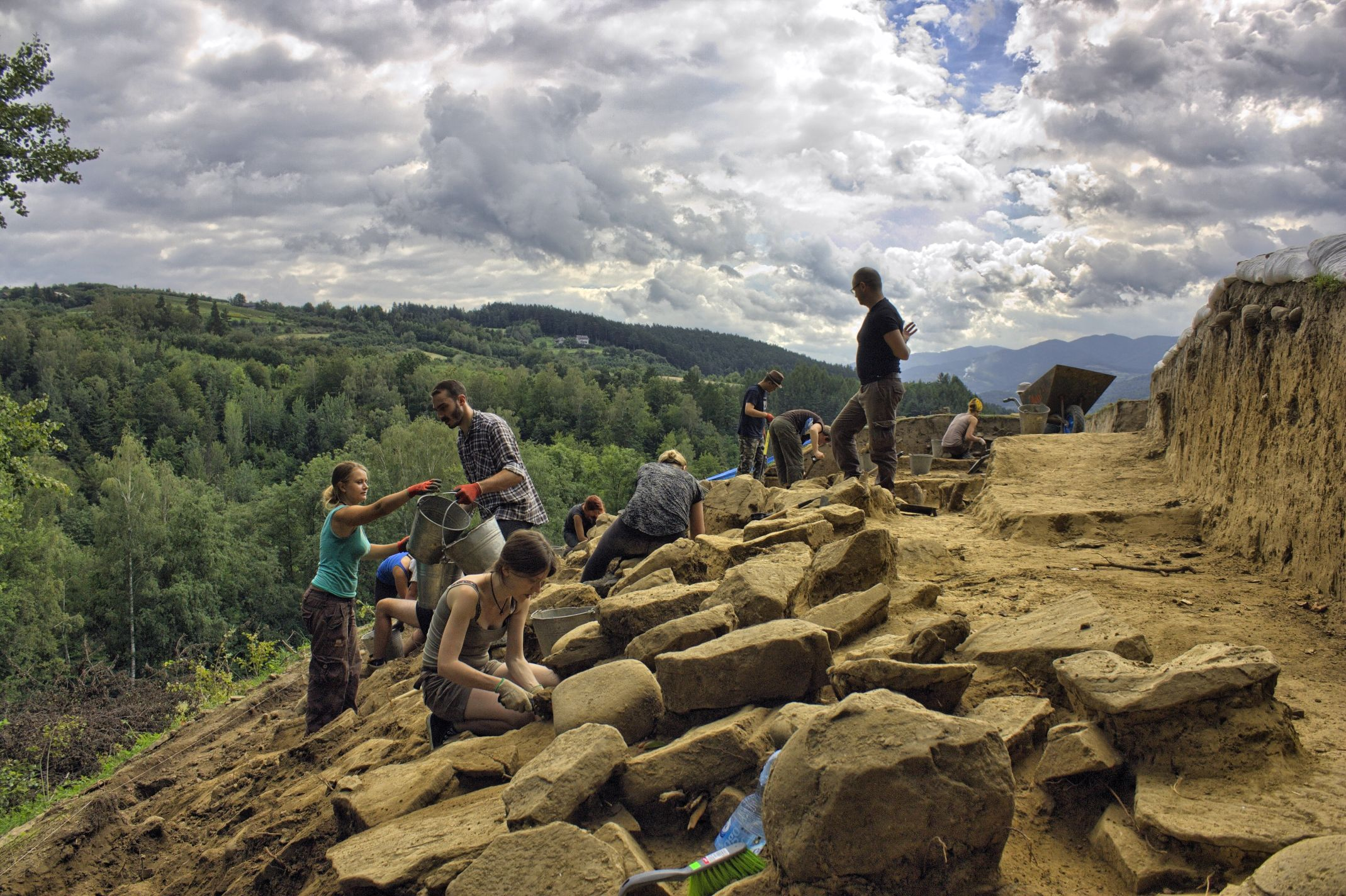 Góra Zyndrama. Prace na stanowisku archeologicznym.